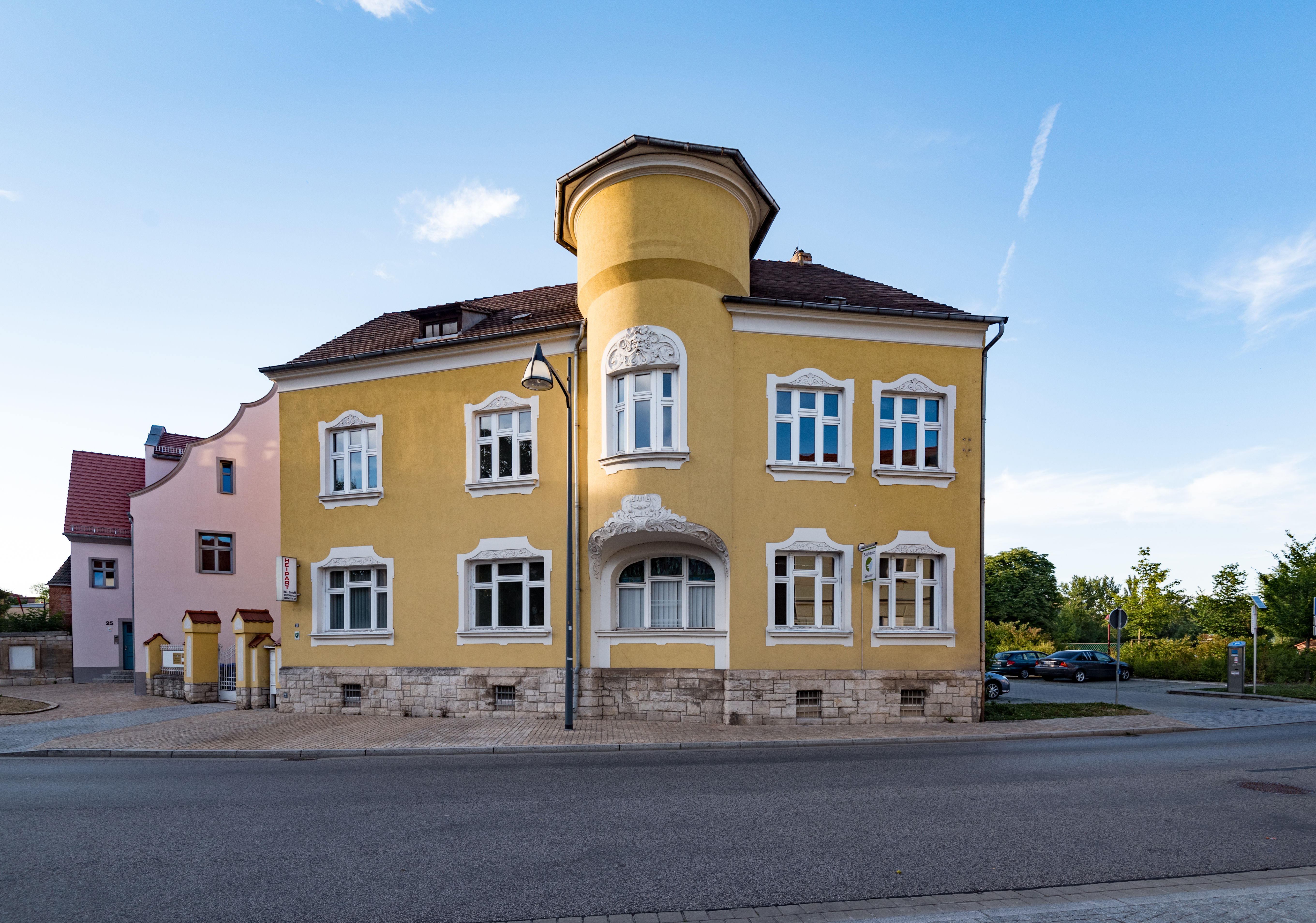 Weißenfels, Dammstraße 21